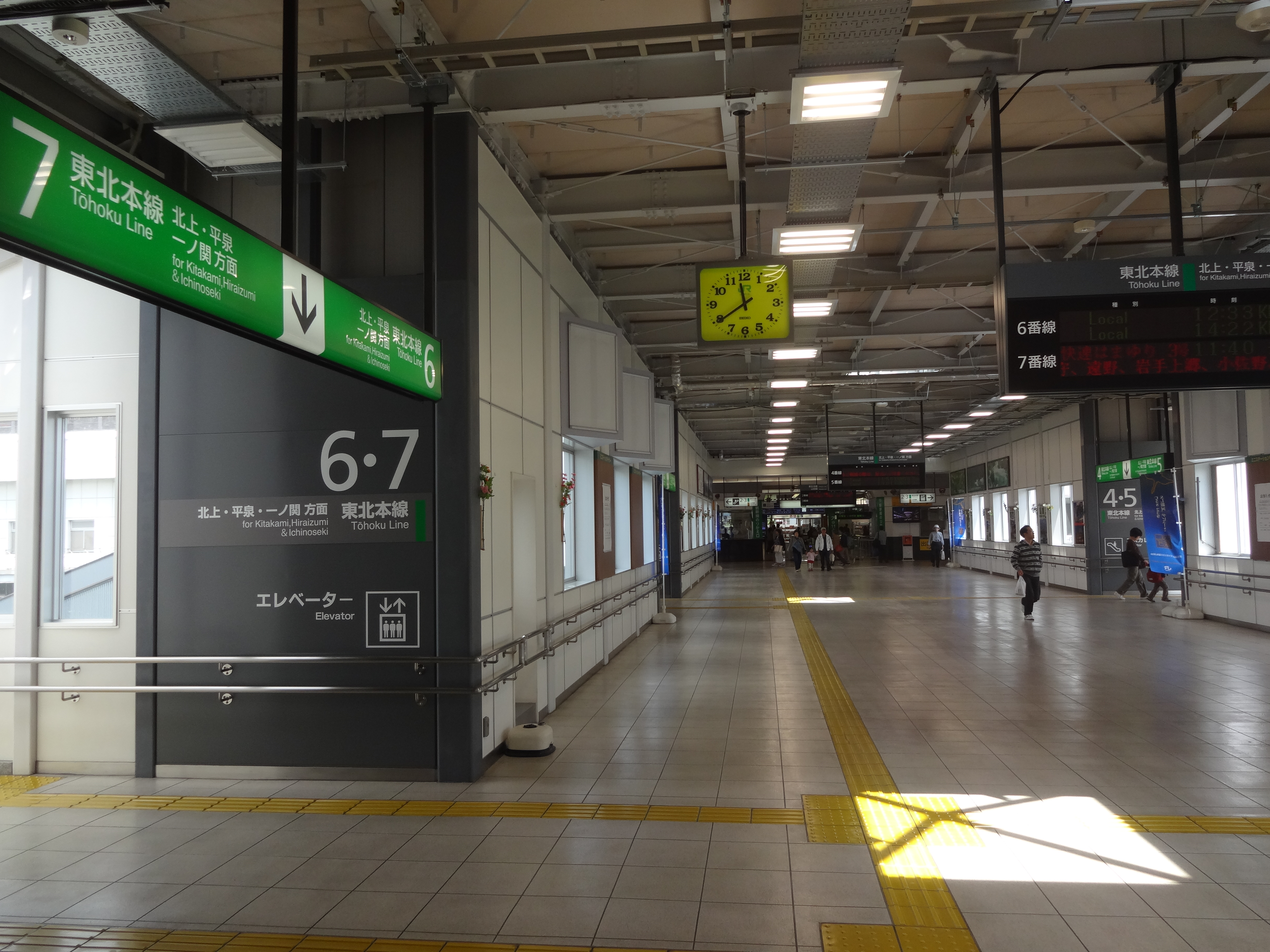 盛岡駅在来線連絡口